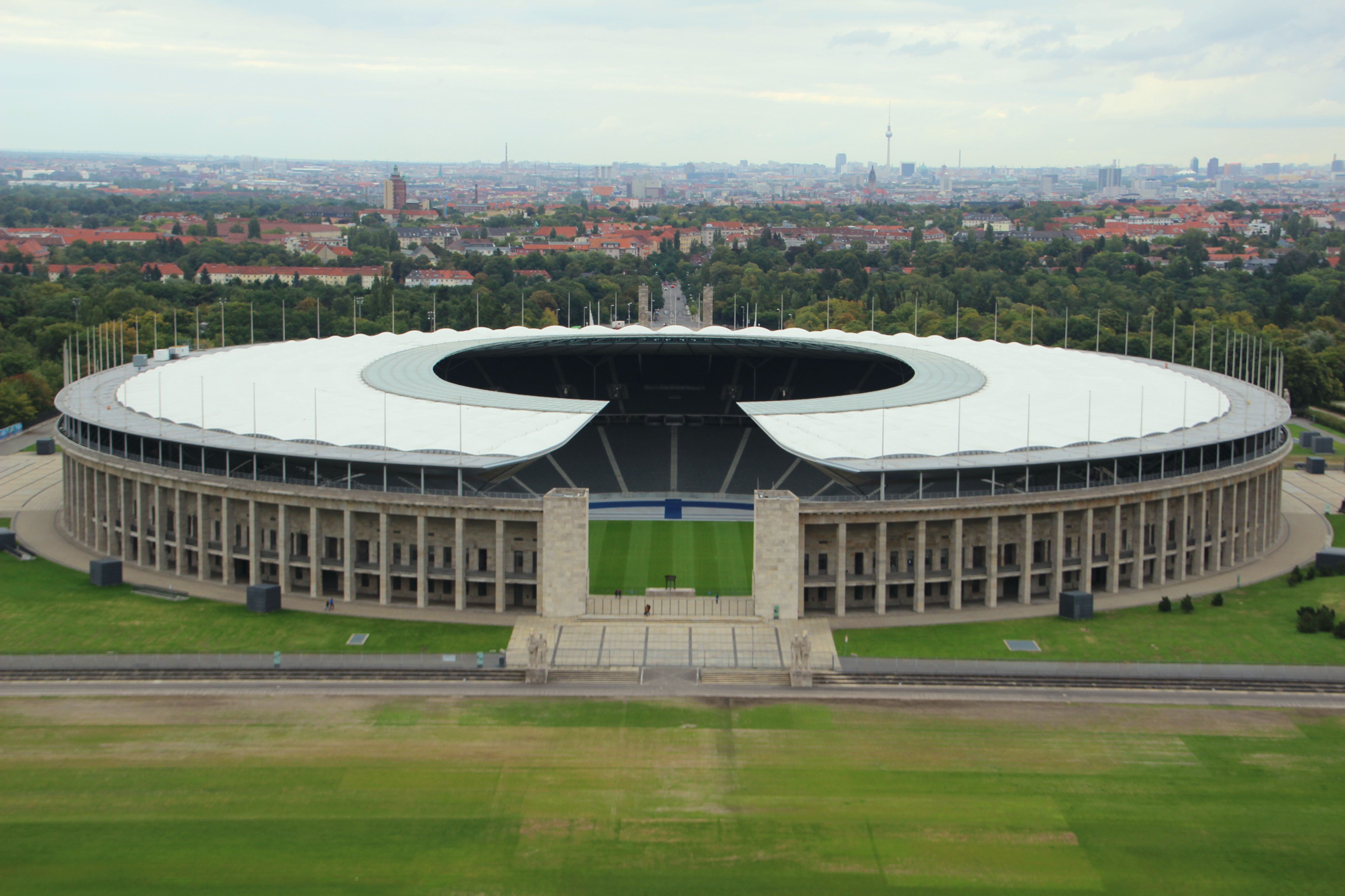 Das Berliner Olympiastadion von oben.This is a photograph of an architectural monument.